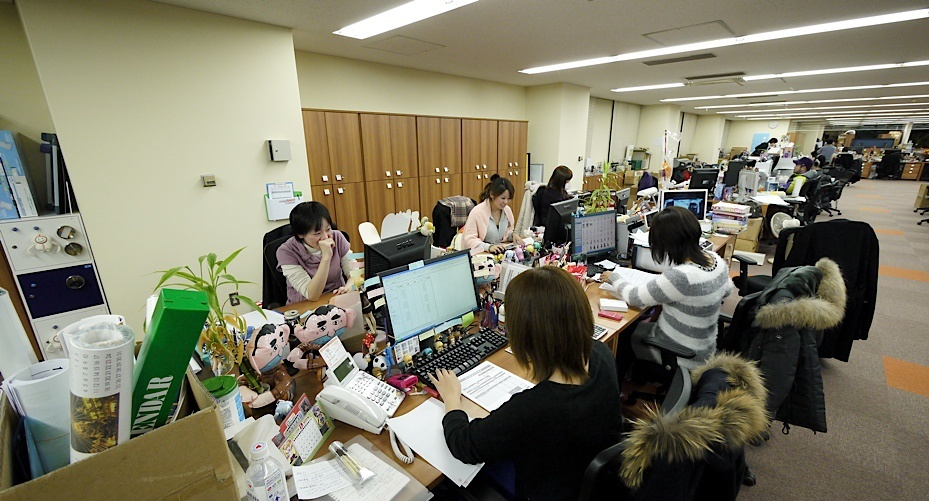 Desk O ladies.